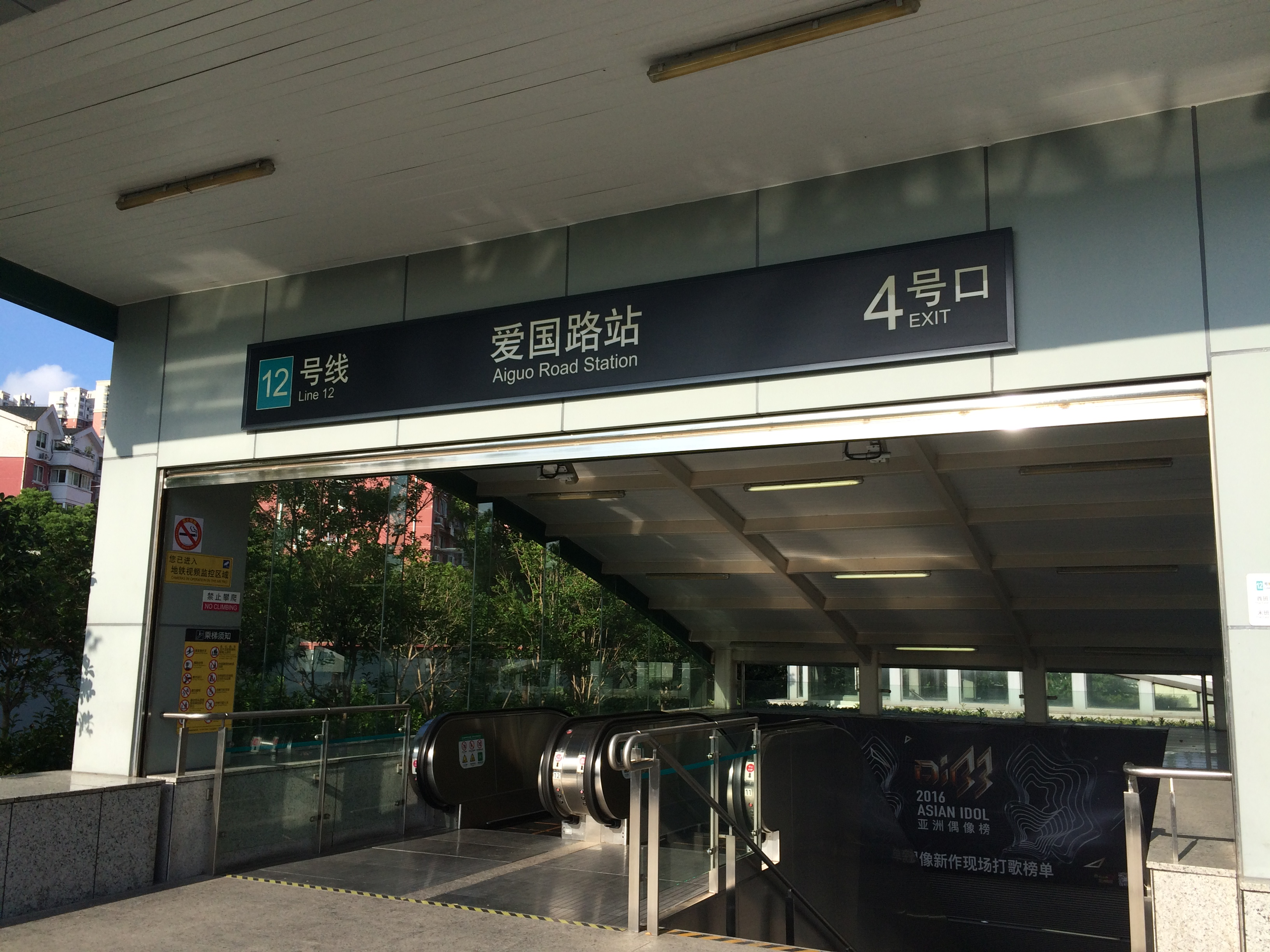 愛国路駅の4番出口 2017年8月2日撮影